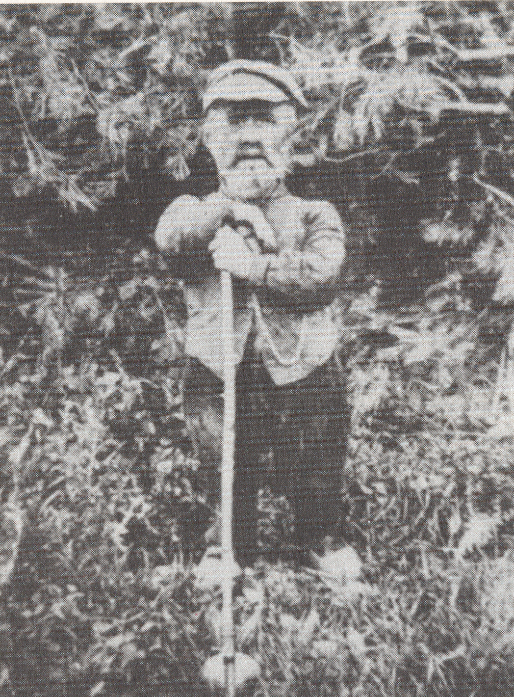 Foto van een onbekende fotograaf van Toon(tje) van Els die ook wel bekend stond als Toon d'n Dwerg. Was schaapsherder en leidde een zwervend bestaan. Na zijn overlijden in 1922 werd in Oploo een standbeeld aan hem opgericht.